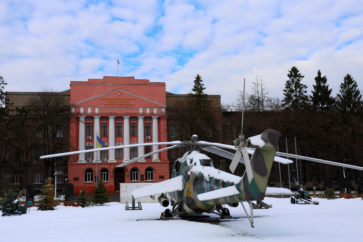 Національний університет оборони України імені Івана Черняховського